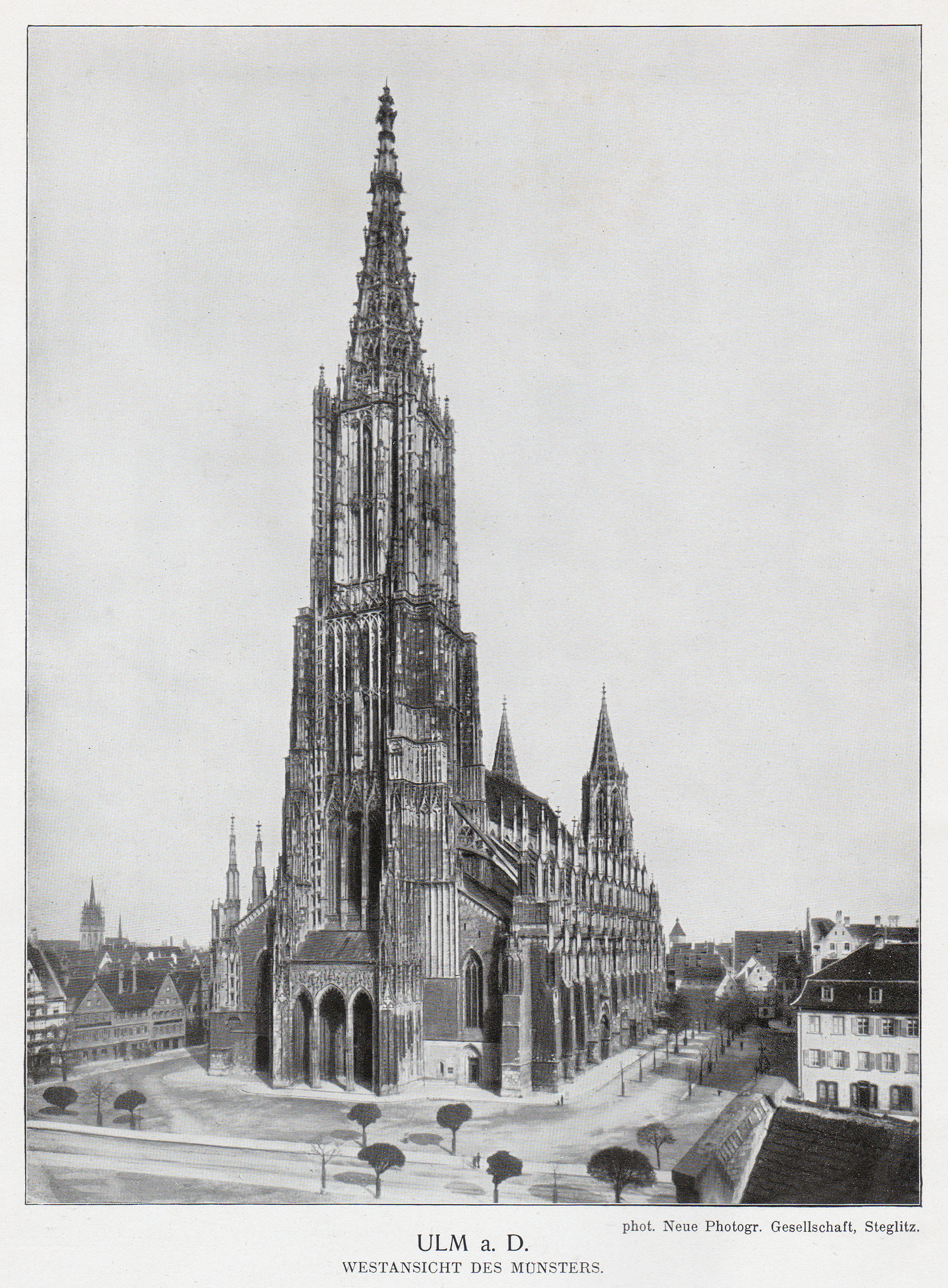 Ulm am Donau, Westansicht des Münsters